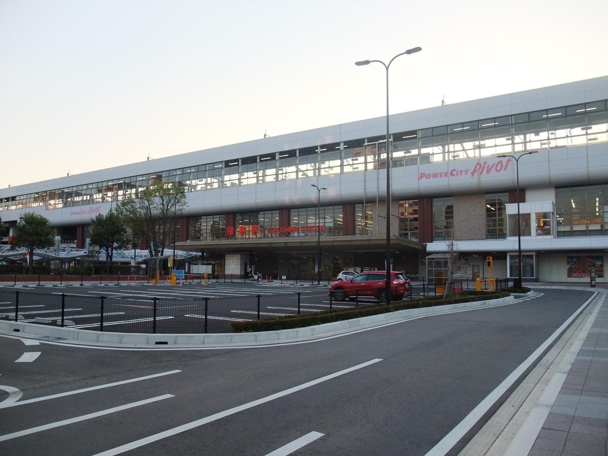 東北本線福島駅西口